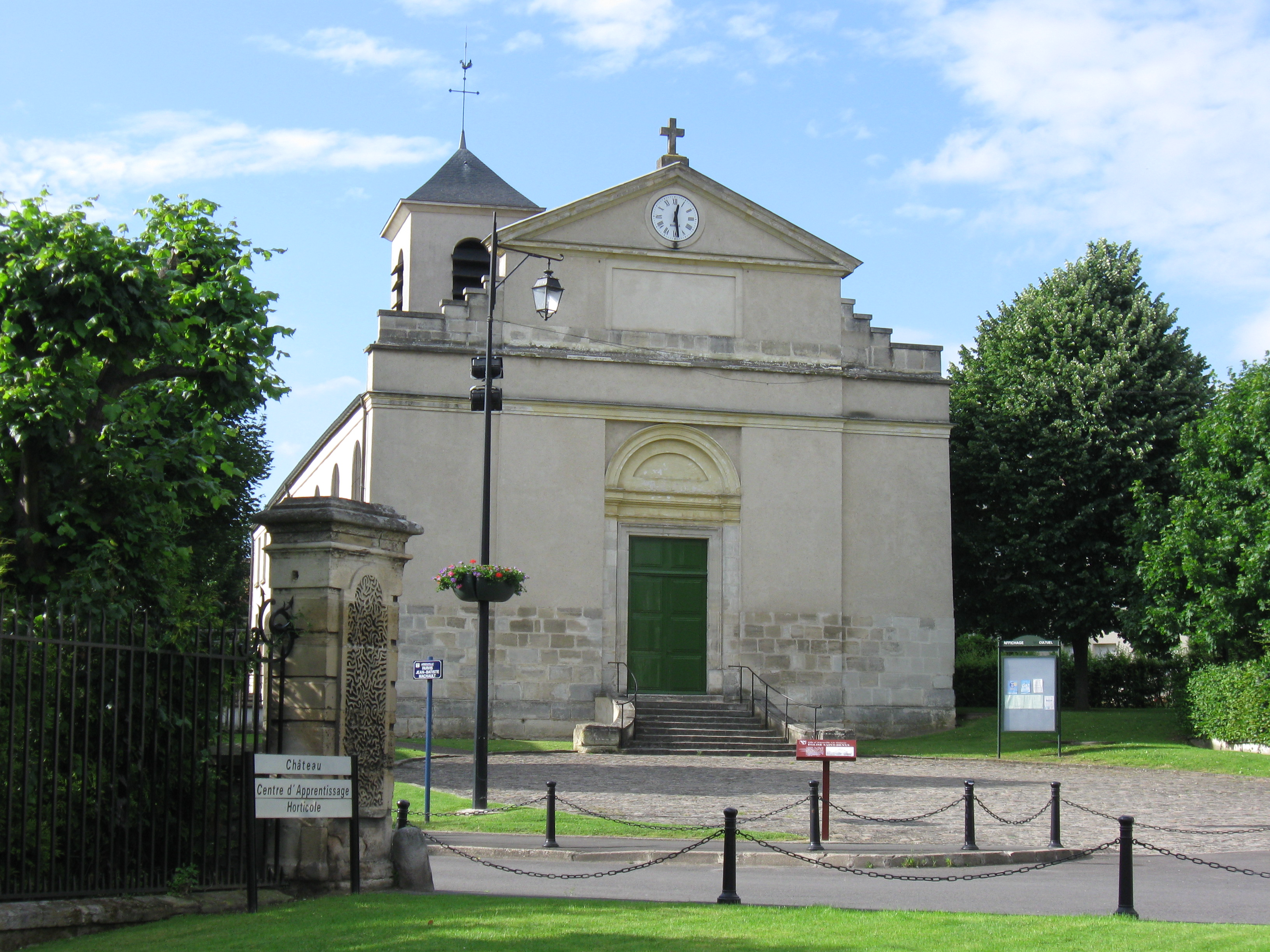 Église Saint-Denis d'Arnouville. (Val-d'Oise, région Île-de-France).